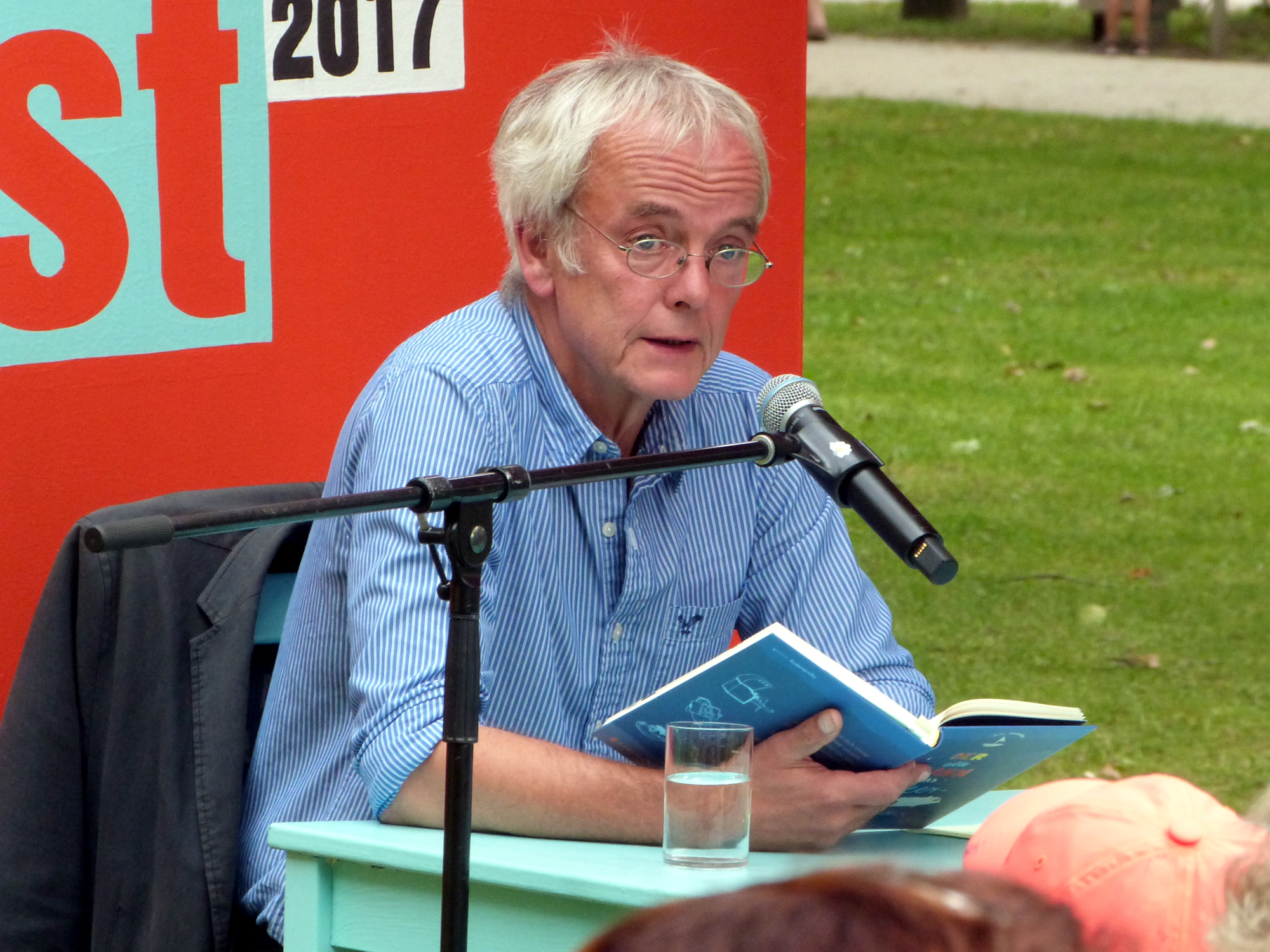 Der Schriftsteller Jens Sparschuh bei einer Lesung auf dem Erlanger Poetenfest 2017.